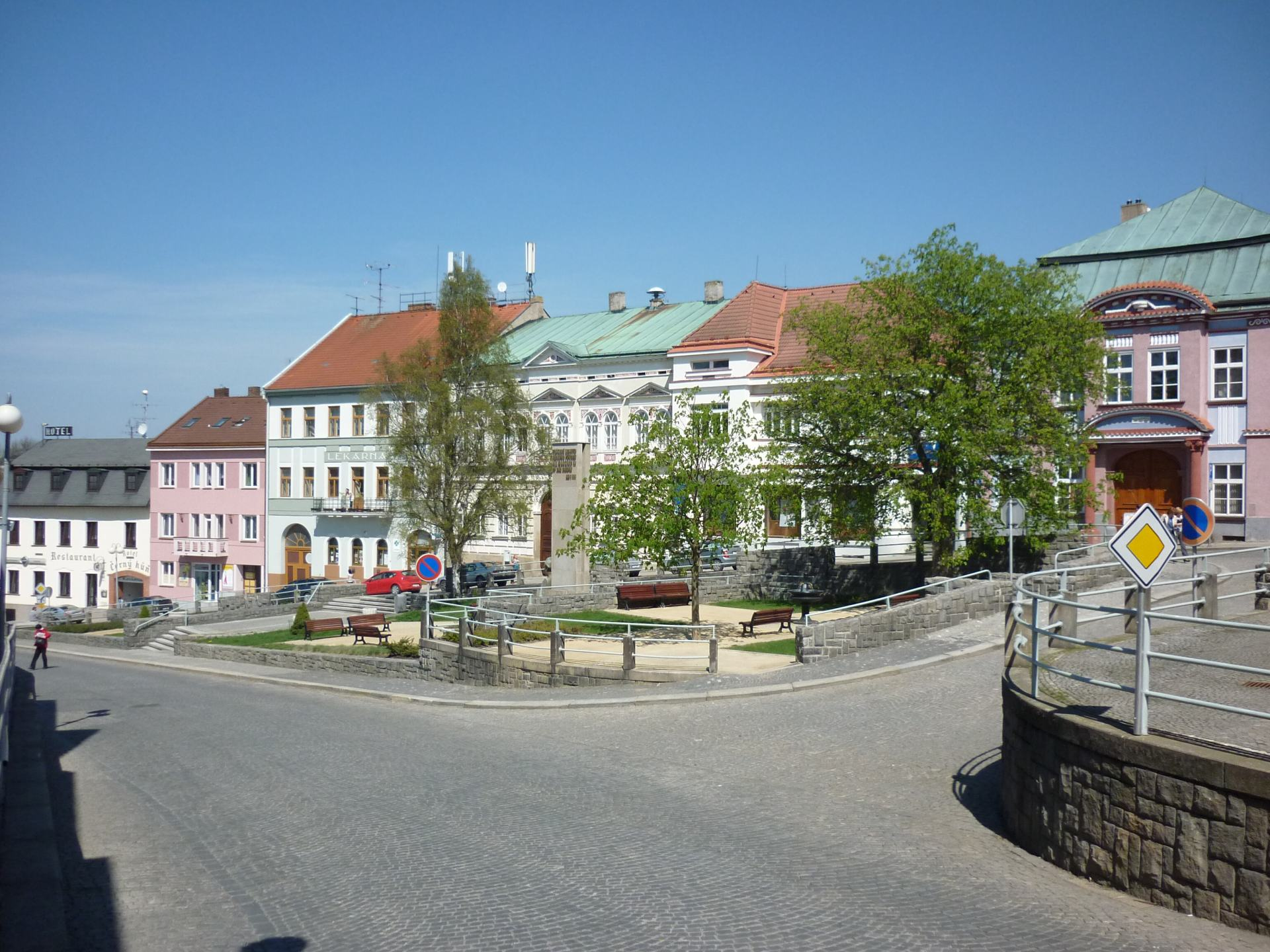 Humpolec